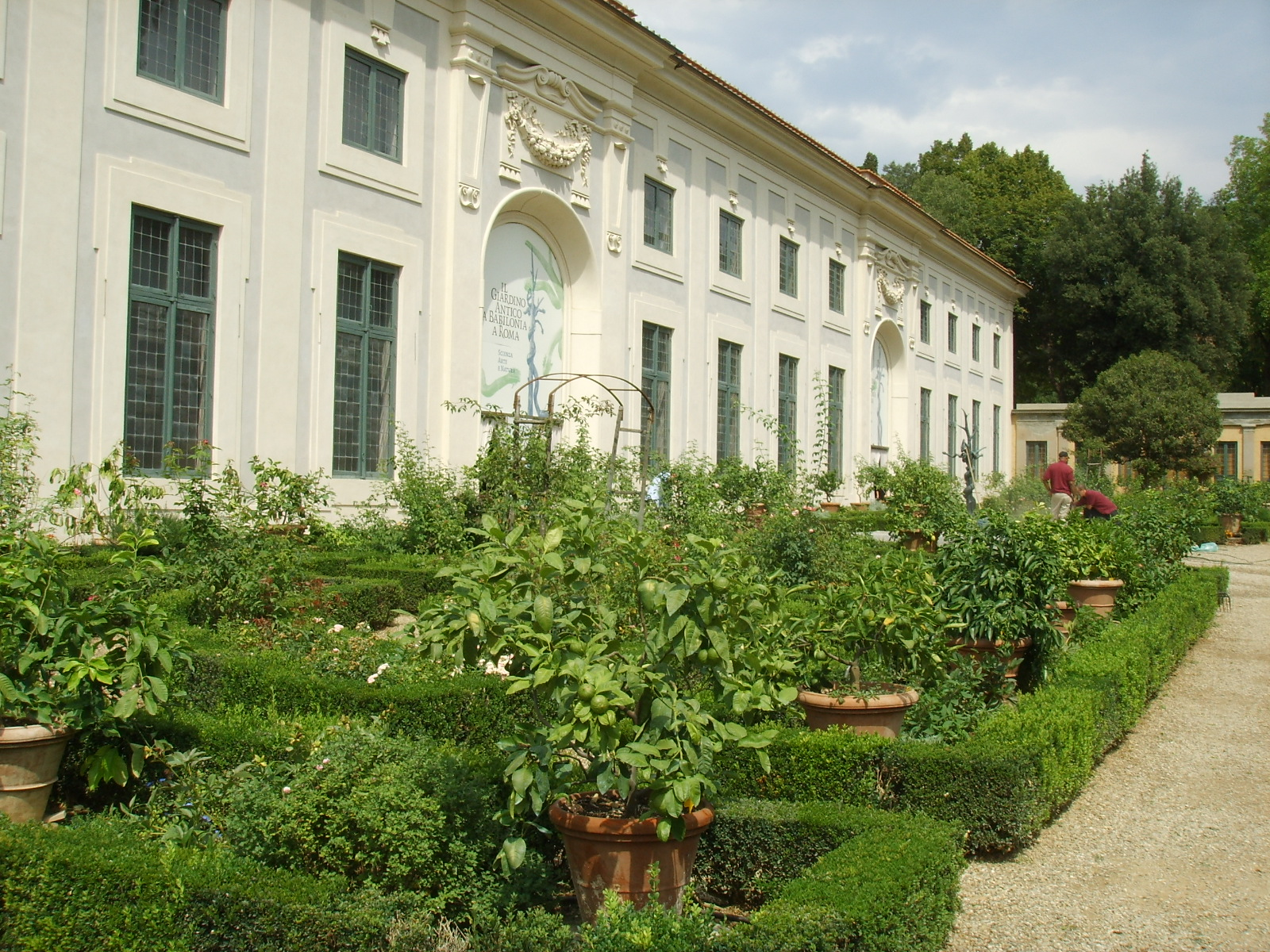 Boboli, la limonaia